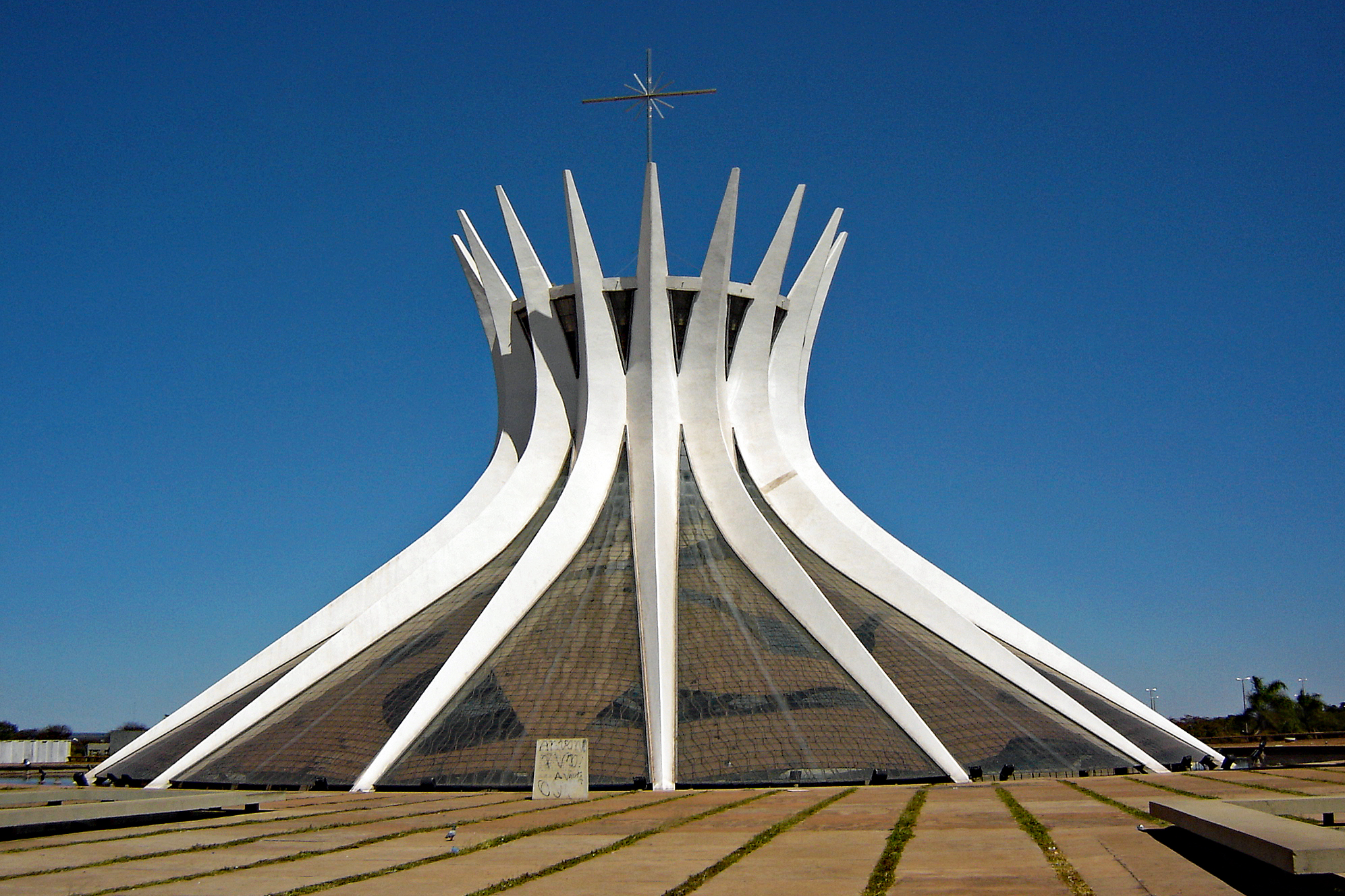 Catedral Metropolitana Brasília, Plano Piloto, Brasília, DF